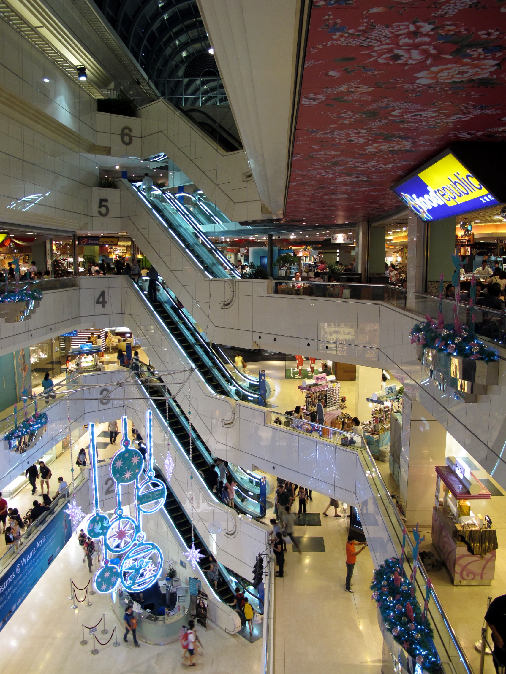 Wisma Atria Arium